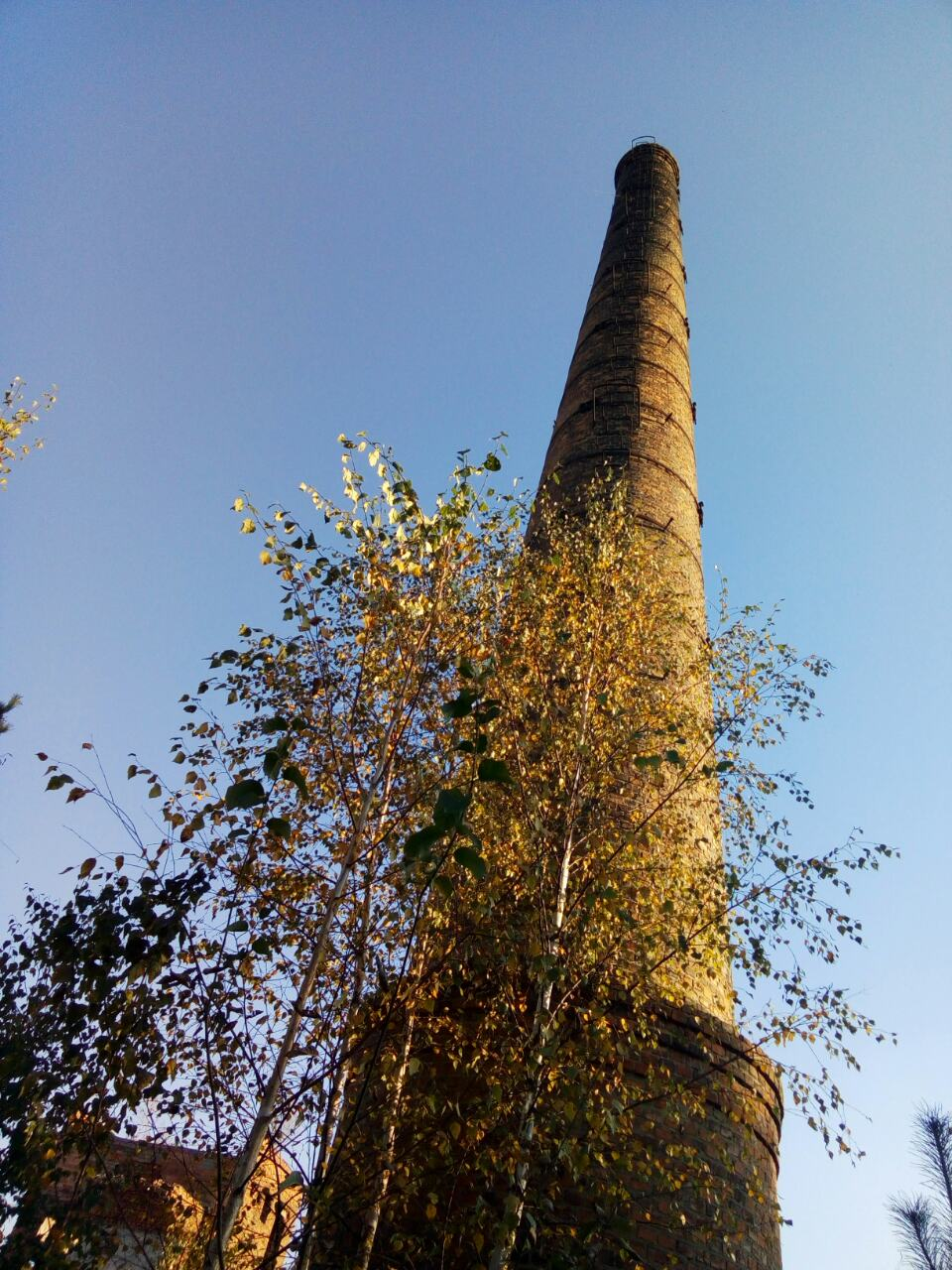 Наразі завод не працює